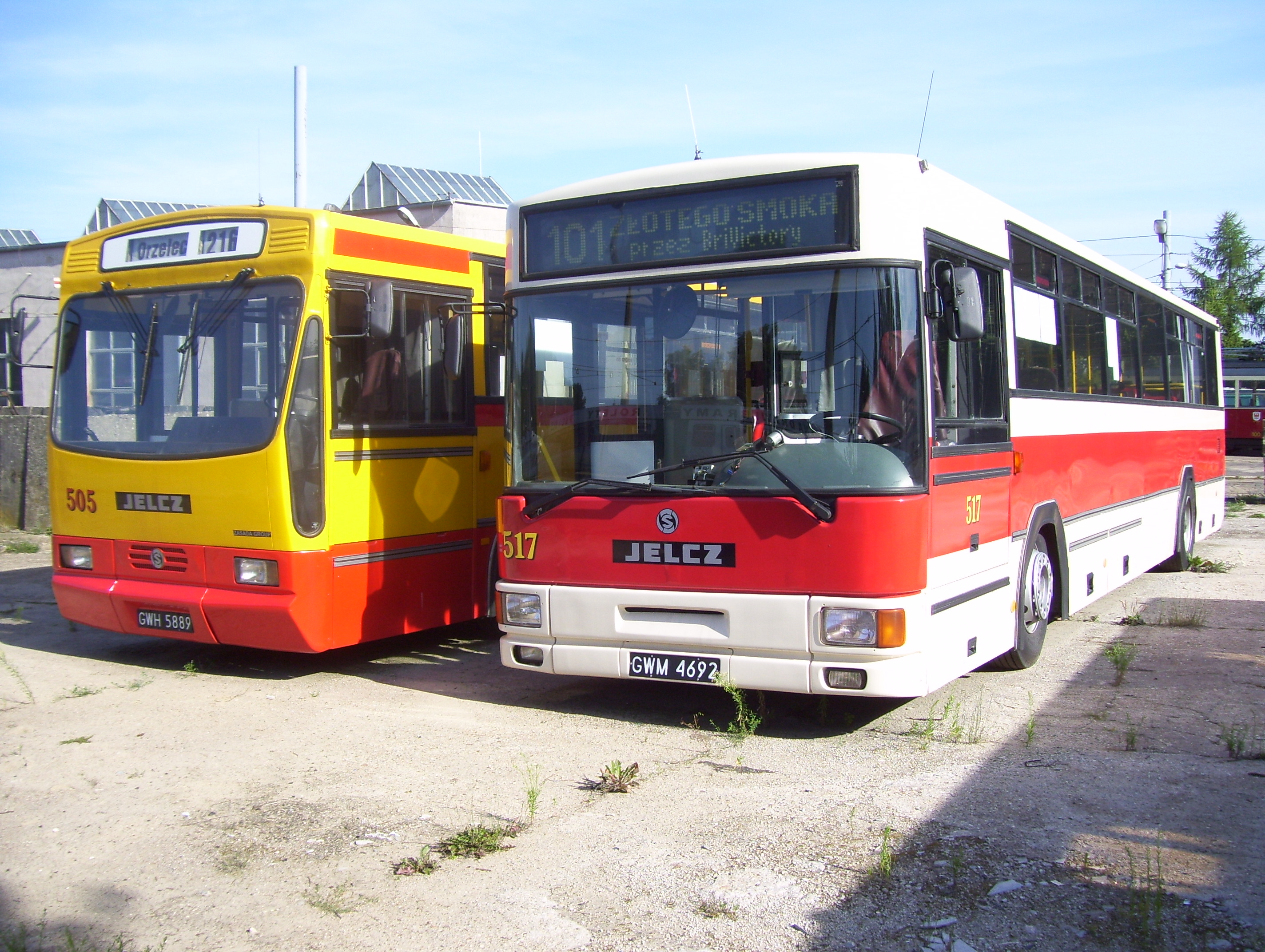 Zabytkowy Jelcz 120MM/2 #517 na terenie zajezdni.